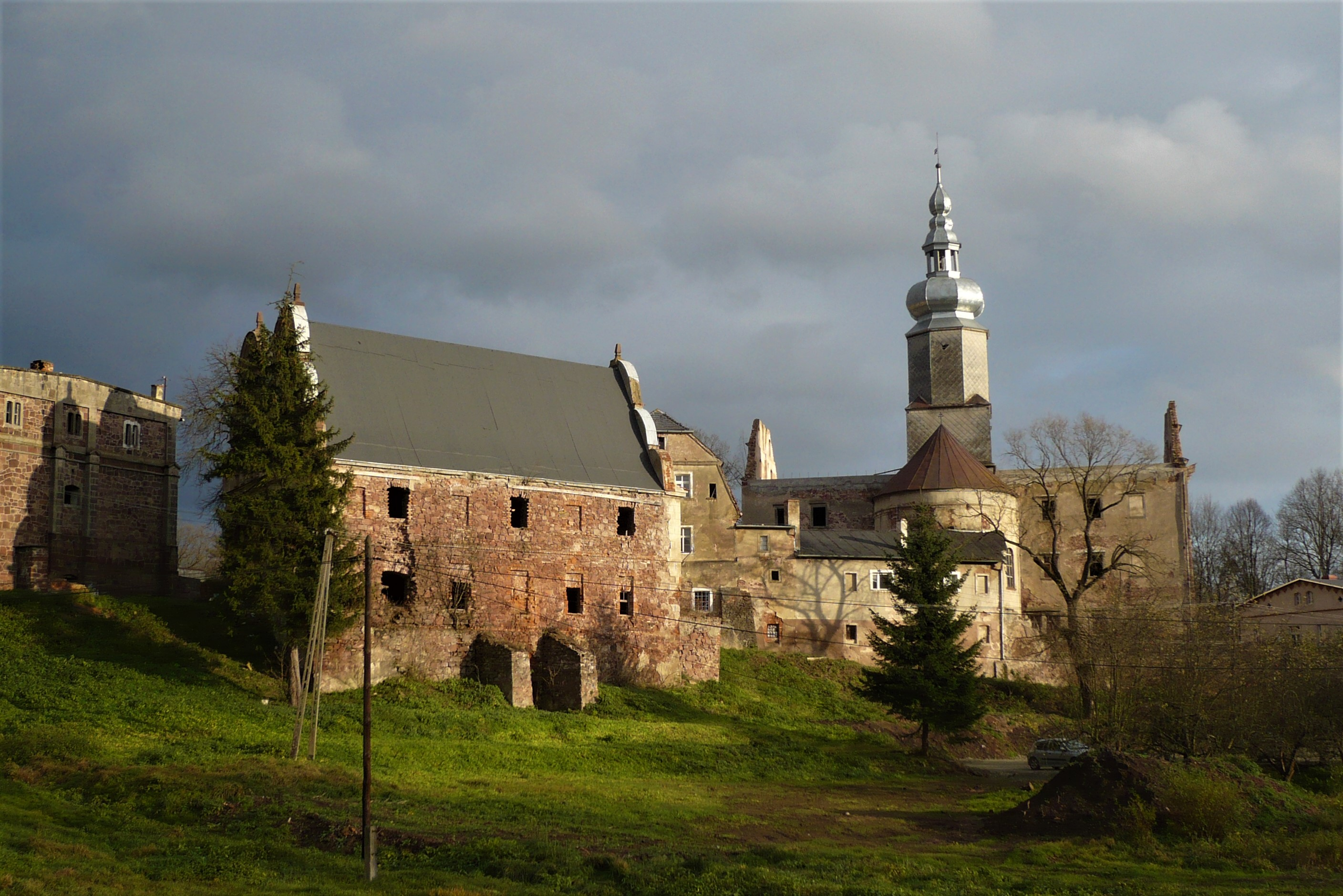 Zamek Sarny